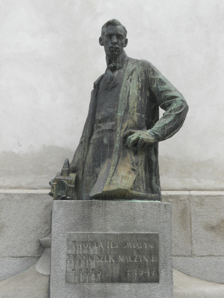 Pomnik Franciszka Mączyńskiego. Rzeźba Xawerego Dunikowskiego przy Kościele Najśwętszego Serca Pana Jezusa w Krakowie na ulicy Mikołaja Kopernika.